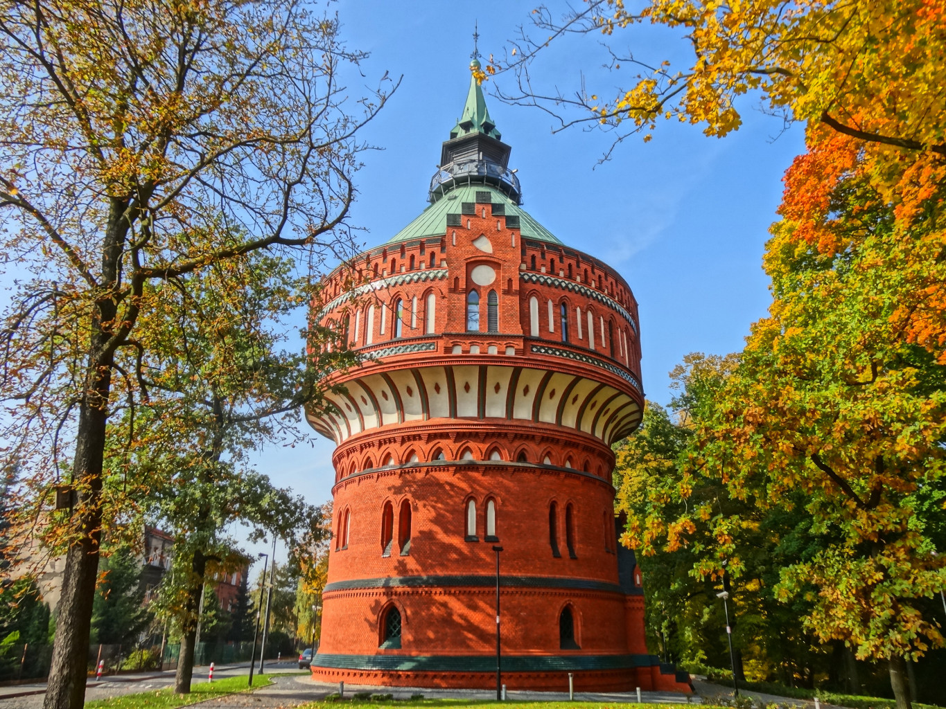 Wieża ciśnień w Bydgoszczy przy ul. Filareckiej, zbud. w 1900 roku, mieści Muzeum Wodociągów i Kanalizacji, a na szczycie galerię widokową